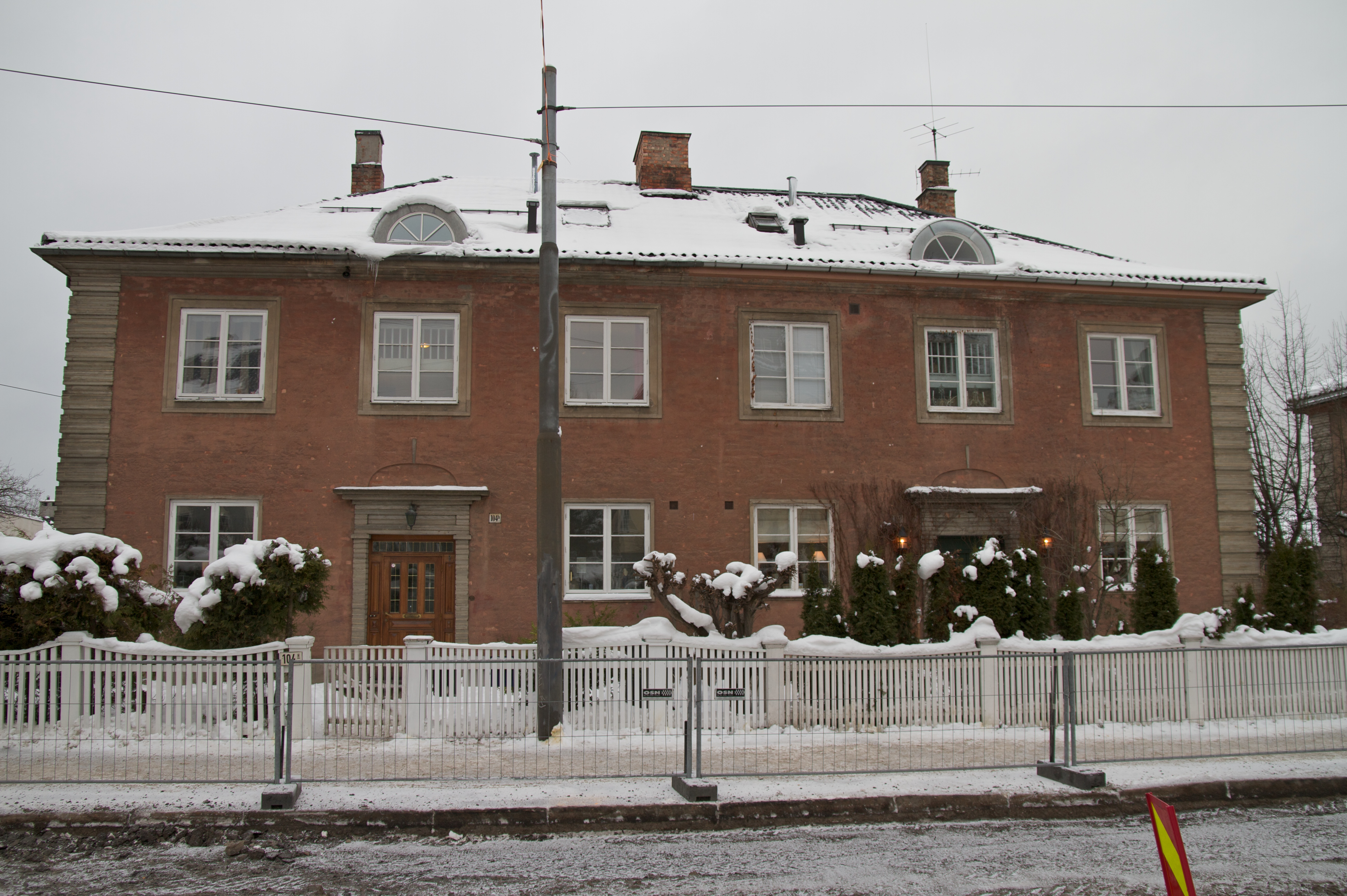 Drammensveien 104 H-J i Oslo fra 1919. Arkitekt Ragnvald Tønsager.